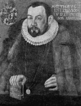 Prof. Matthäus Enzlin 1556-1613, Proträt in der Tübinger Professorengalerie